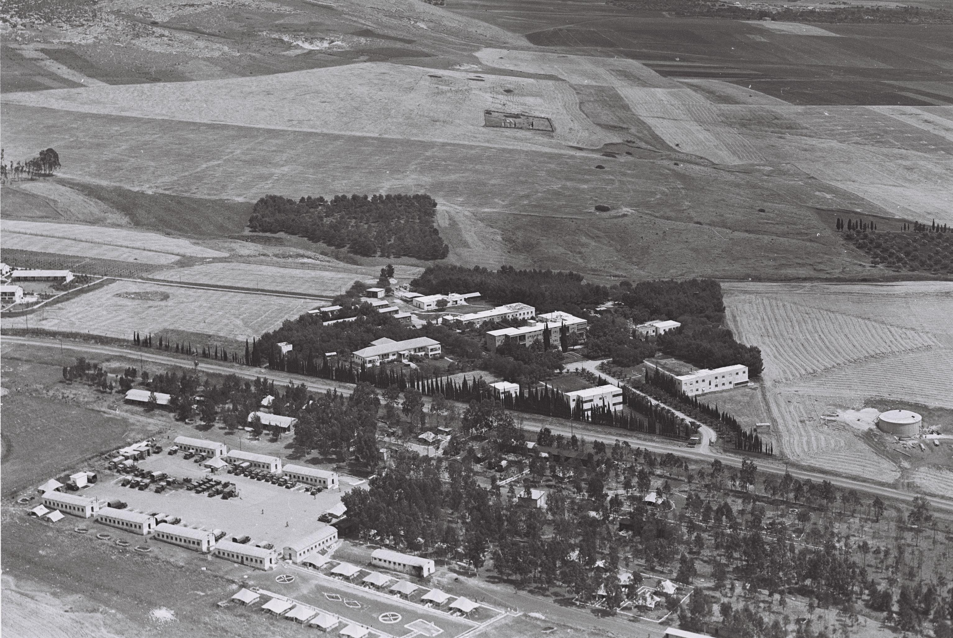 תצלום אווירי של בית חולים אזורי בעפולה משנת 1948, היום בית חולים העמק